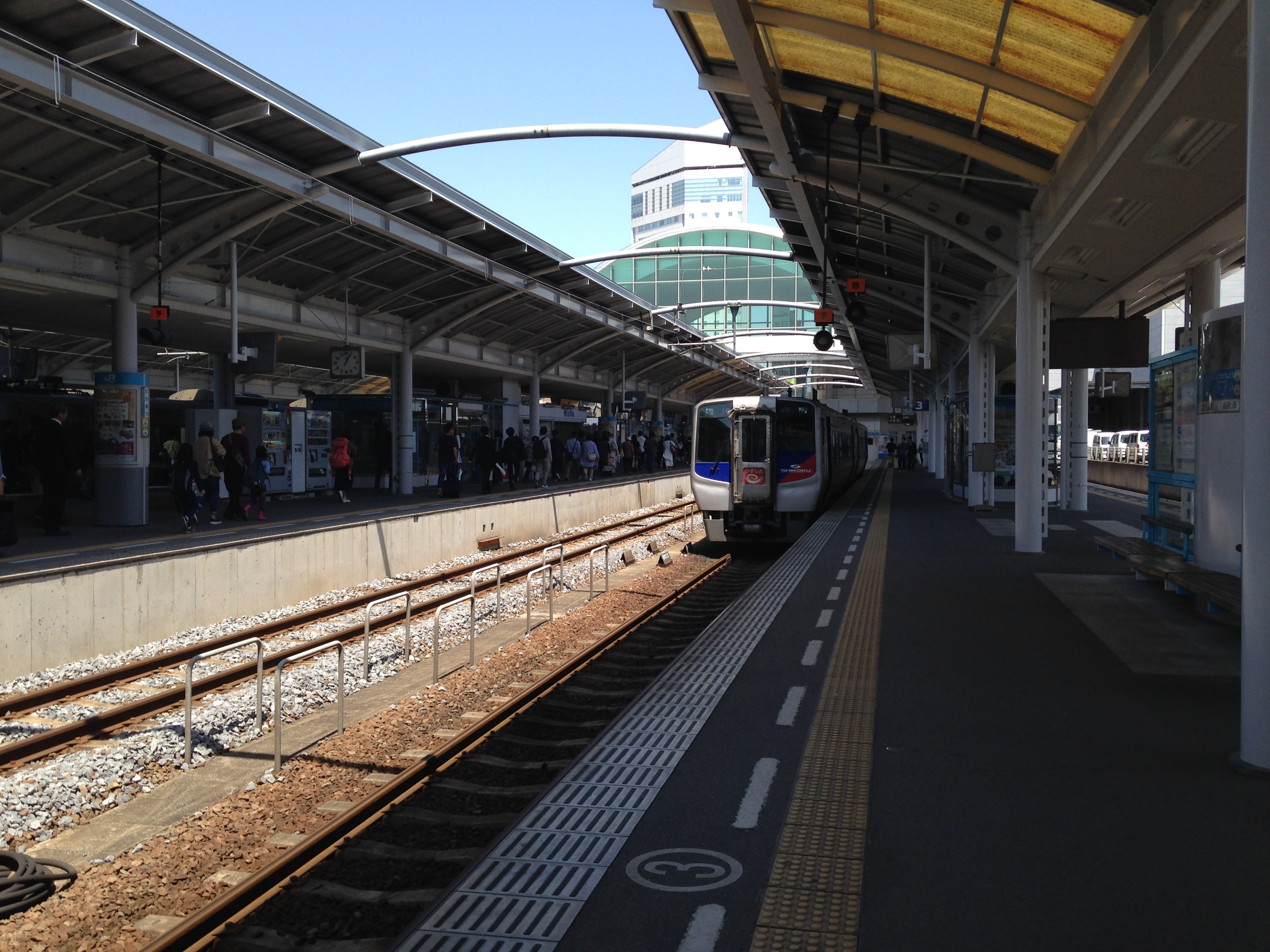 高松駅(香川県)の2・3番ホームより駅舎方面を望む